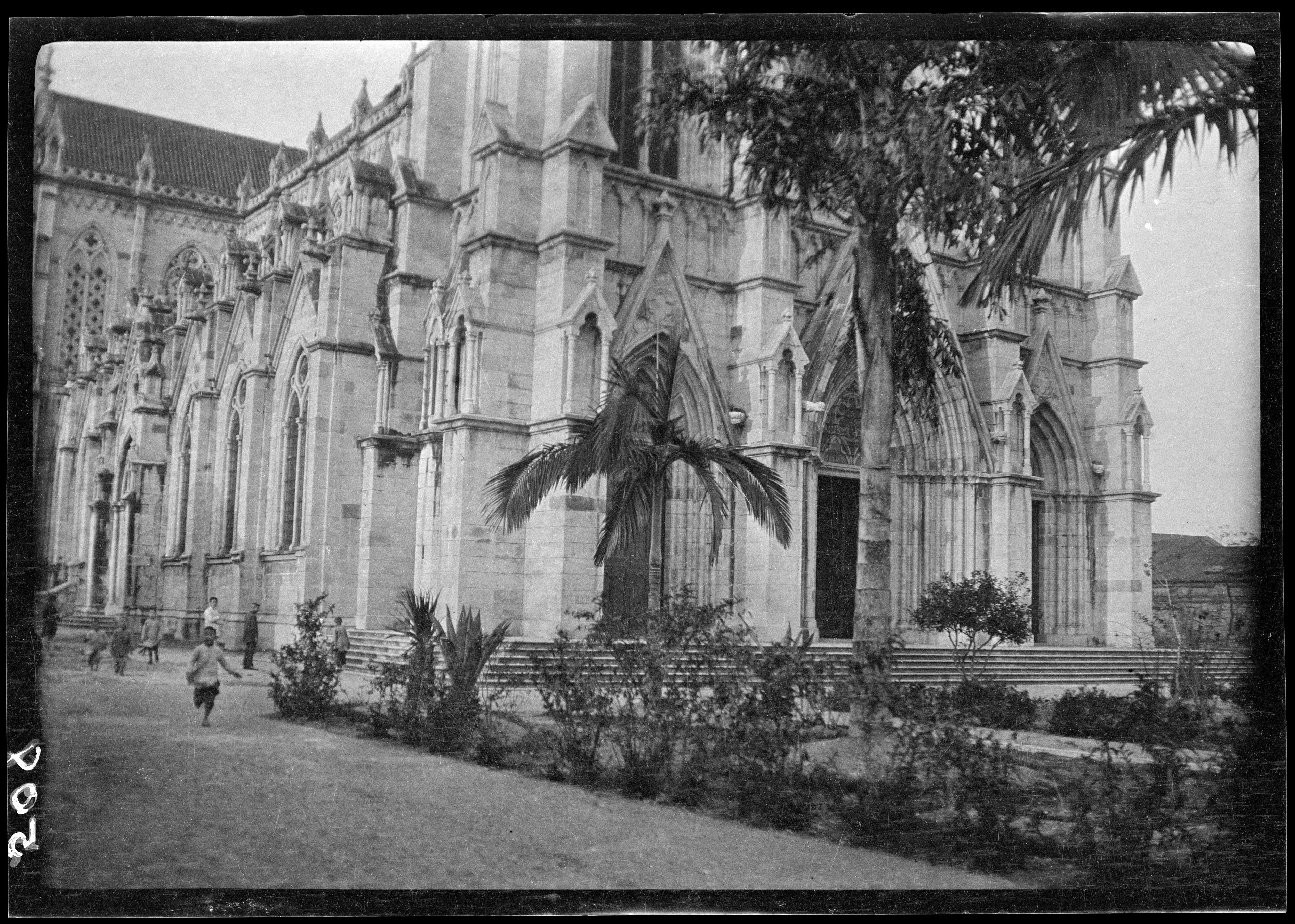 廣州石室聖心大教堂